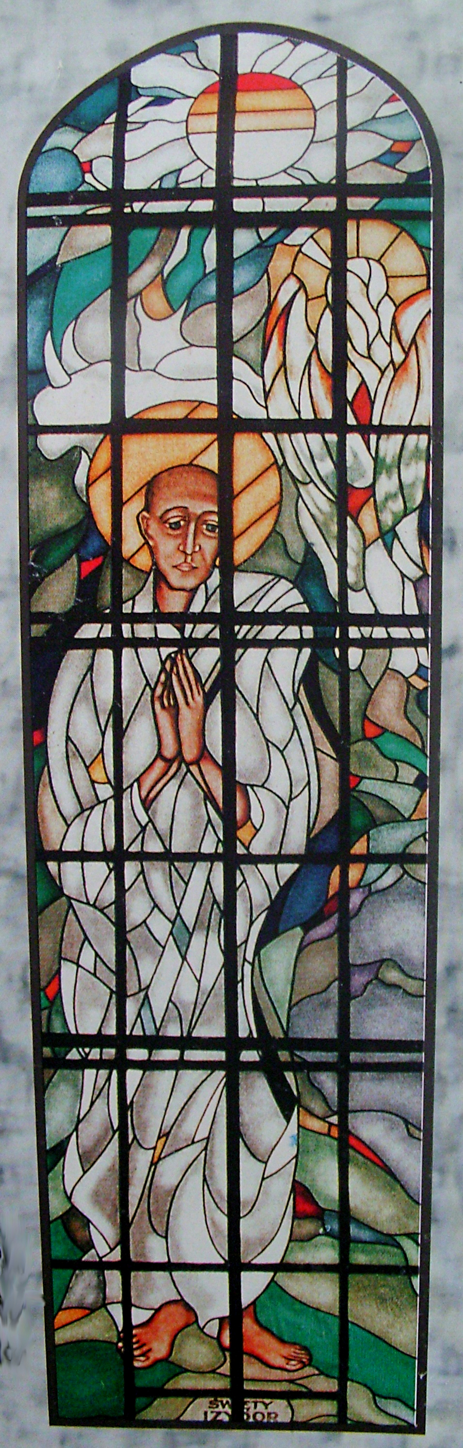 św. Izydor - witraż w kościele Imienia Maryi w Bączalu Dolnym (diecezja rzeszowska)